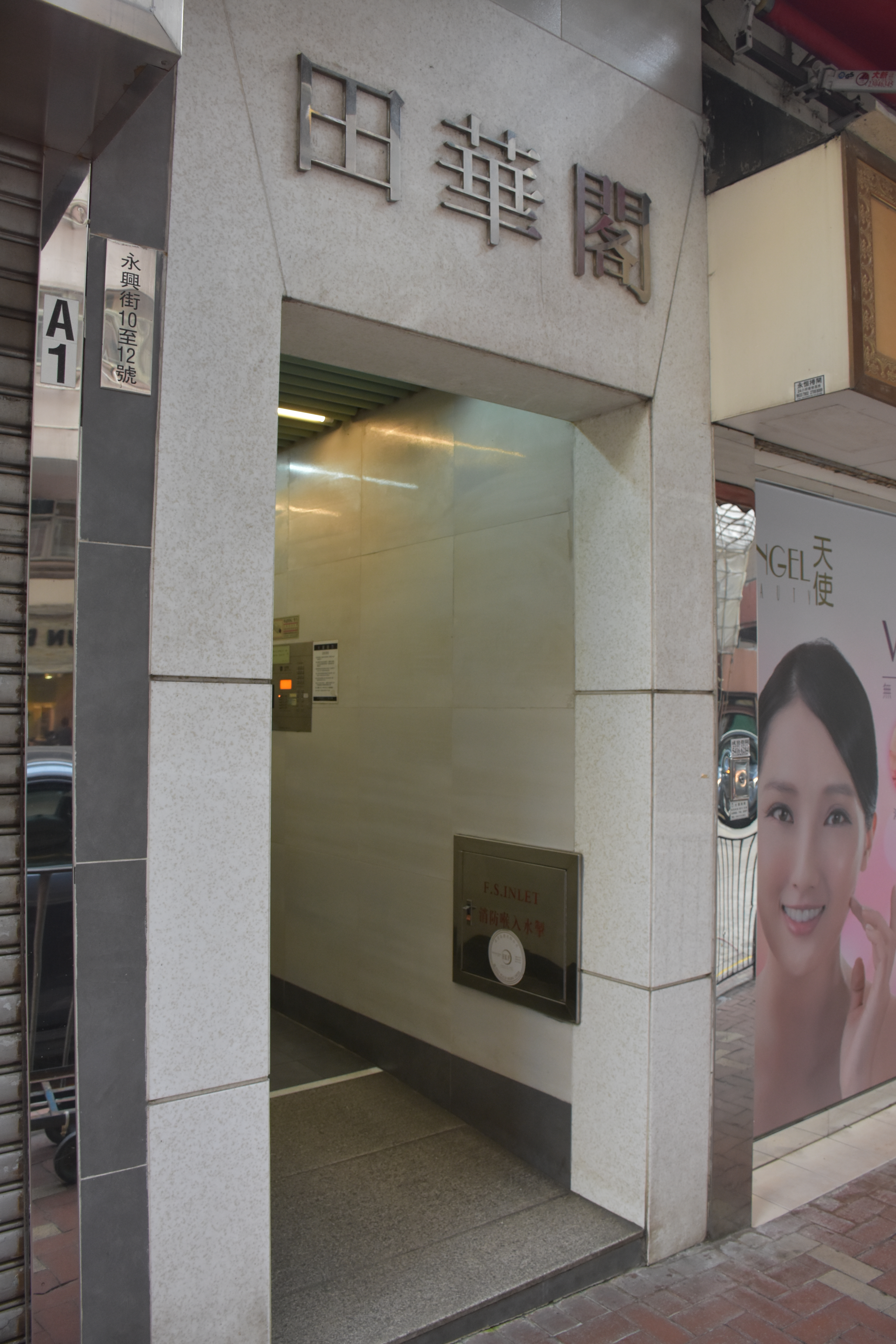 中文（香港）: 田華閣主入口。